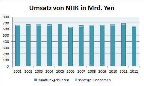 Das Diagramm zeigt den Umsatz der Sendeanstalt NHK von 2001 bis 2012, der sich vor allem aus den Rundfunkgebühren zusammensetzt.